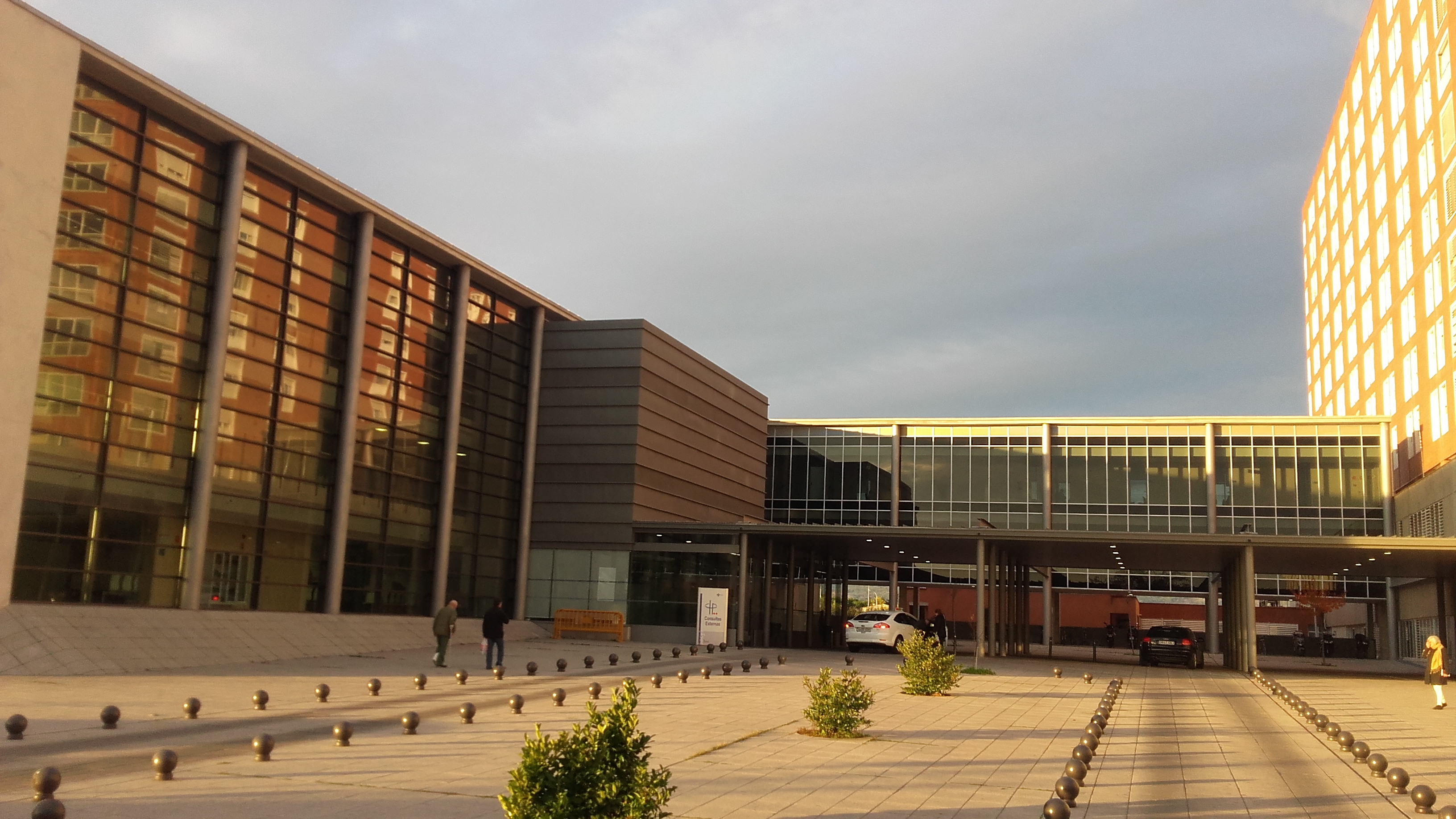 Hospital Río Carrión de Palencia (España)